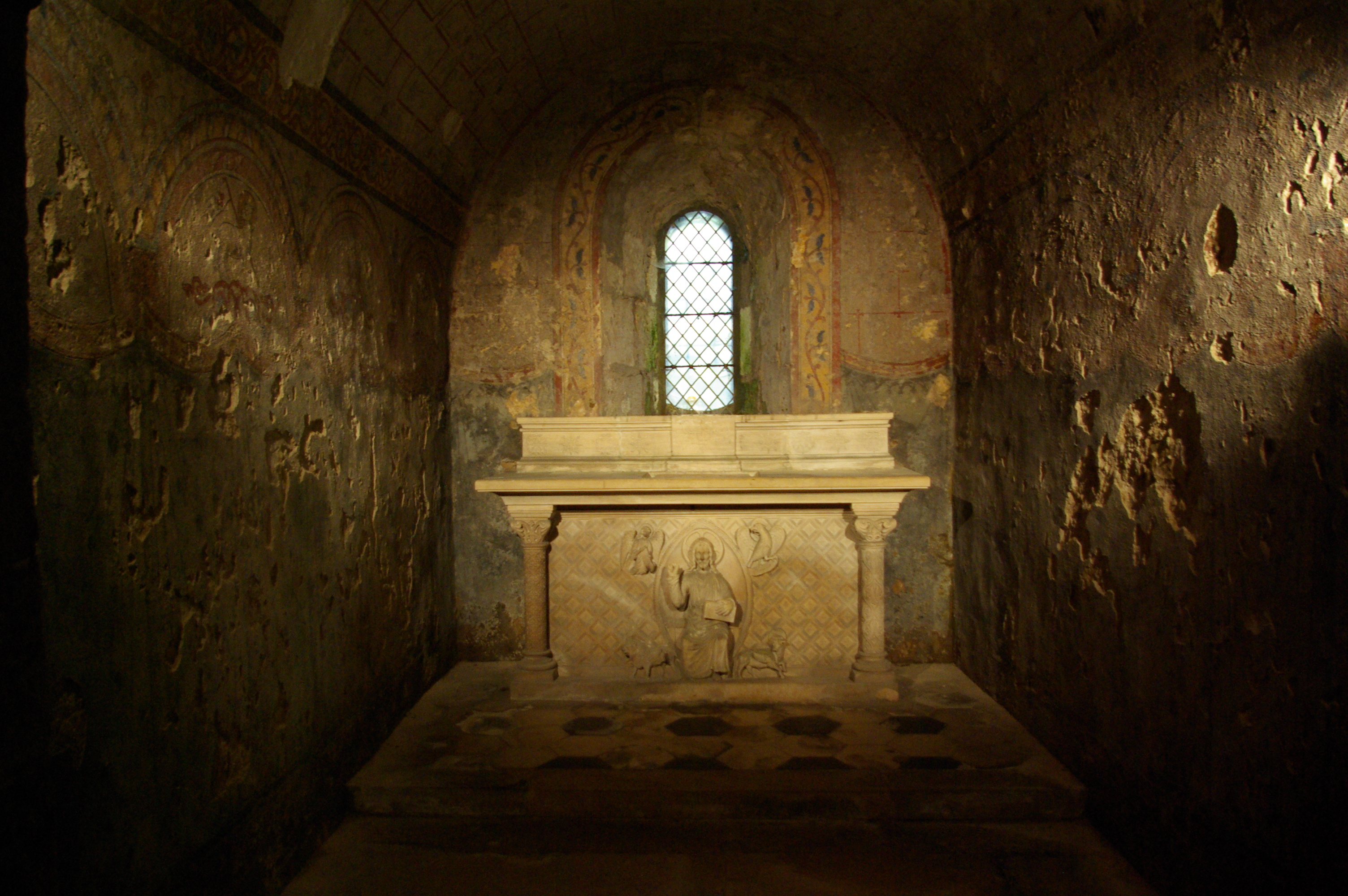 Peintures murales dans la crypte de l'Abbaye Saint-Philibert de Tournus